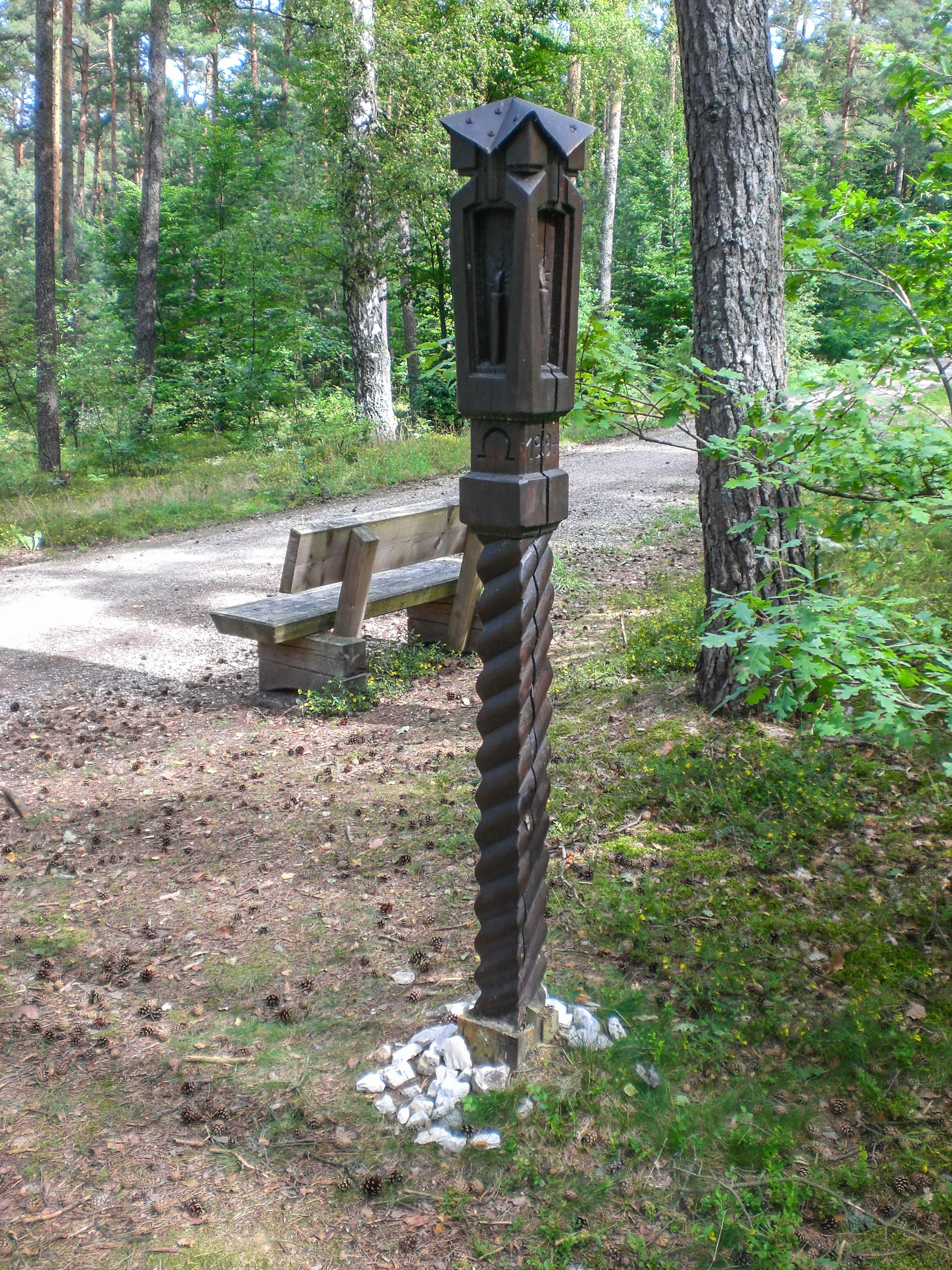 Totenmaterl, Weissenbrunn